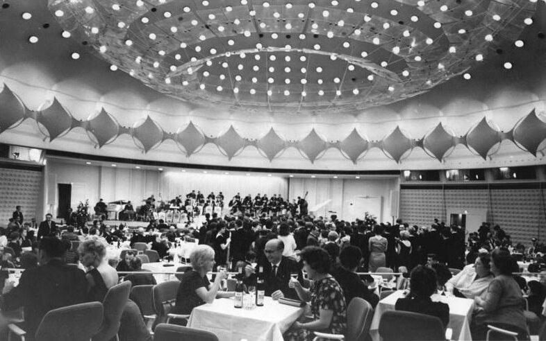 Berlin, Alexanderplatz, Kongresshalle, Zuschauerraum, Bühne Zentralbild Schaar 4.10.1964 15 Jahre DDR Berlin: Großer Ball der Aktivisten und Neuerer. Zu einem fröhlichen Ball kamen in den Abendstunden am 3.10.1964 die besten Berliner Aktivisten und Neuerer in der Kongreßhalle des Hauses des Lehrers am Alexanderplatz au Einladung des Bezirksvorstandes des FDGB und des Bezirkswirtschaftsrates bein Magistrat von Groß-Berlin zusammen. 20 Millionen MDN haben die Berliner Neuerer durch ihre klugen Vorschläge in den letzten 6 Monaten erarbeitet.